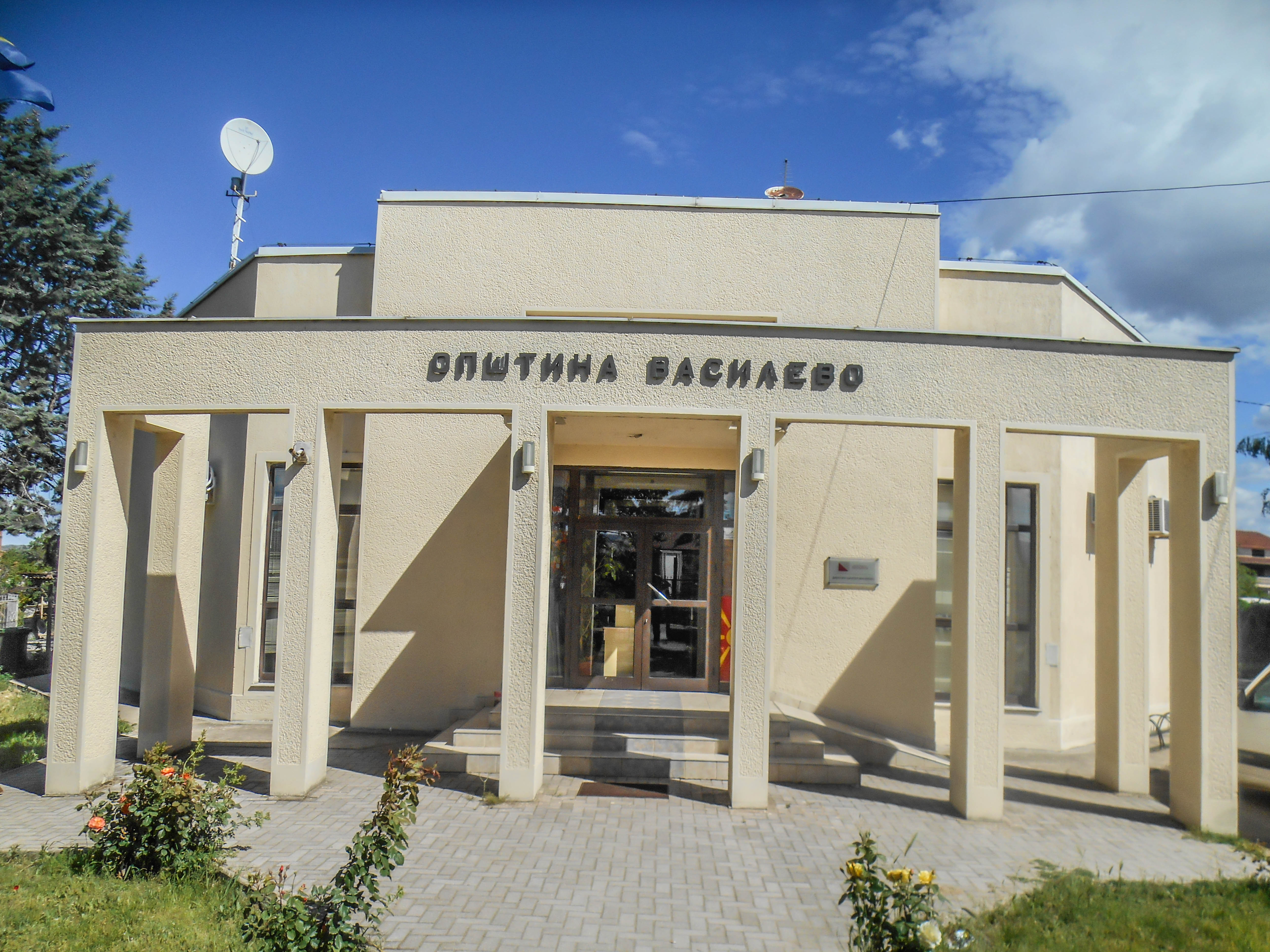 Административна зграда на Општина Василево